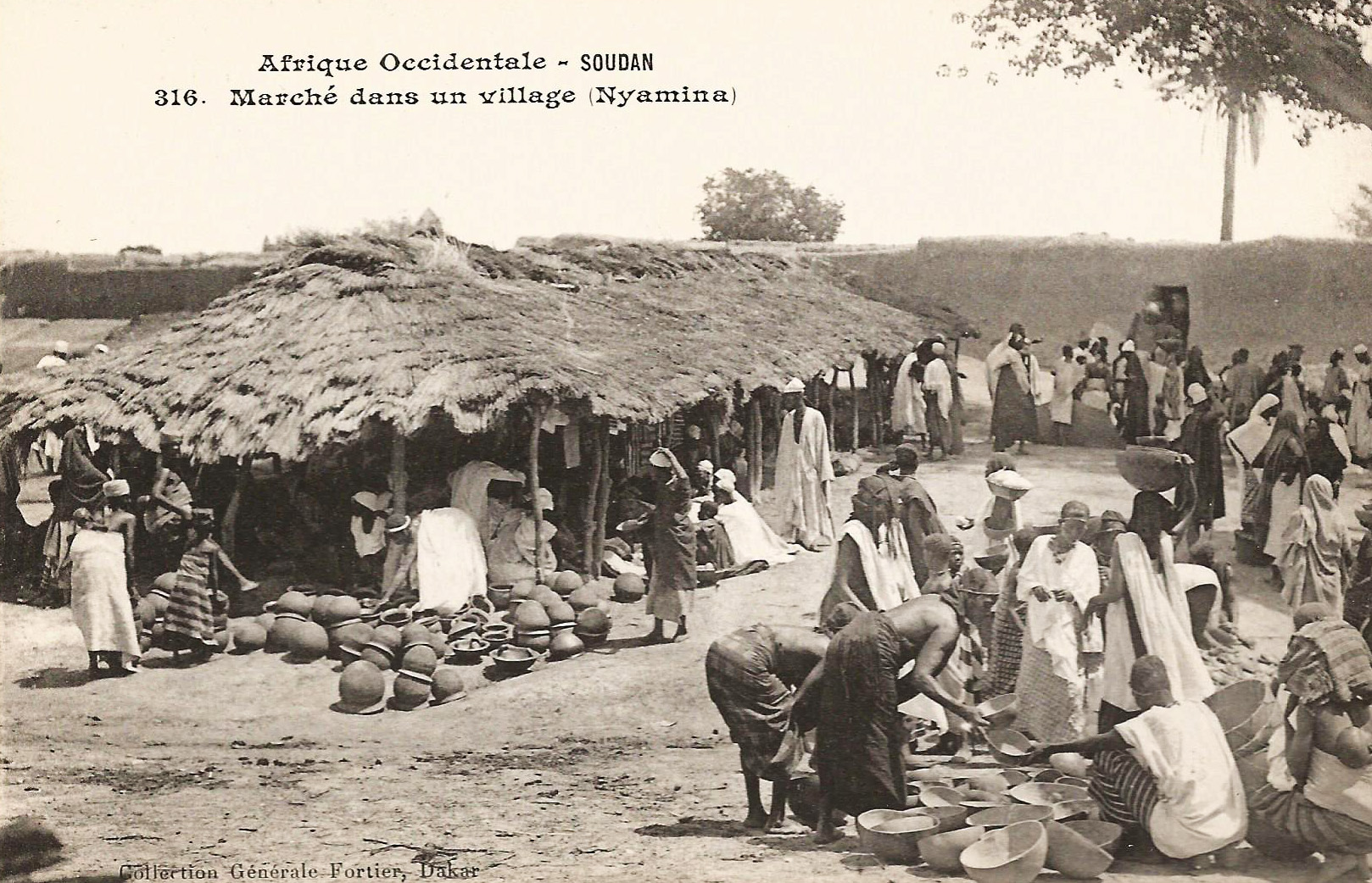 François-Edmond Fortier, Nyamina. Marché dans un village. Afrique Occidentale - Soudan.